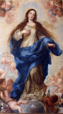 La obra representa la Inmaculada Concepción de la Virgen María, madre de Jesucristo.